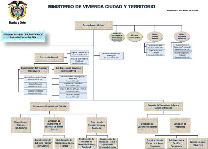 Organigrama Ministerio de Vivienda, Ciudad y Territorio